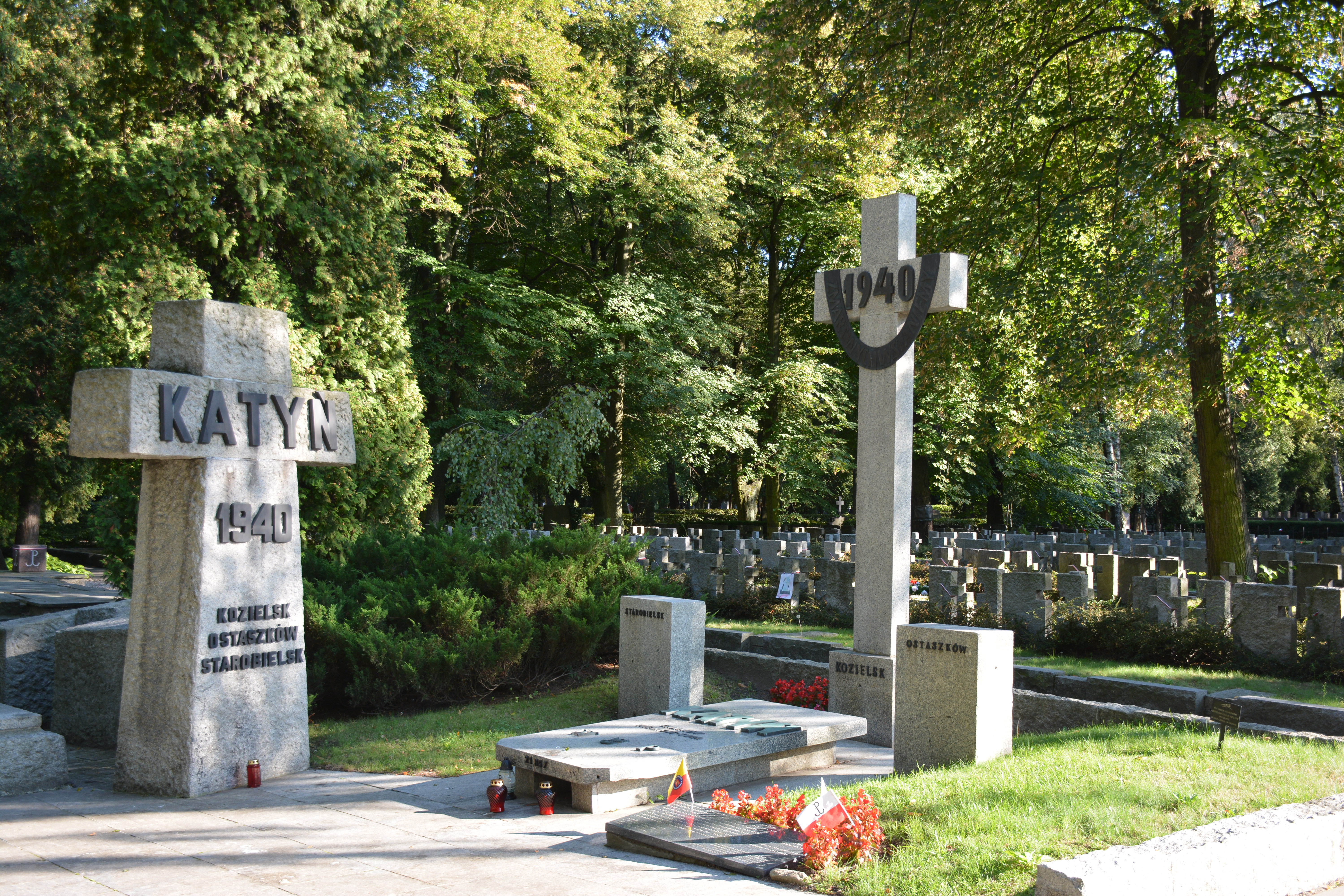 Sady Żoliborskie, Warszawa, Poland